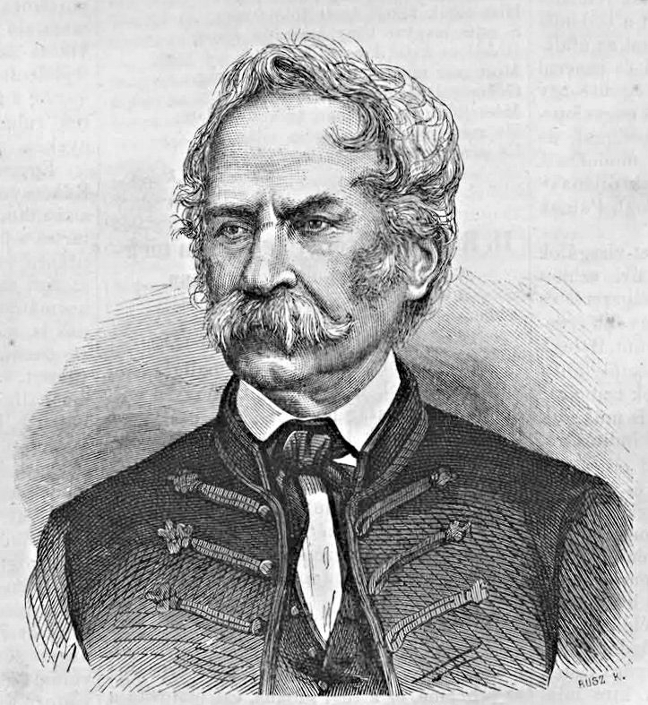 Almási Balogh Pál (1794–1867) orvos. Rusz Károly metszete (Vasárnapi Ujság, 1867. szeptember 29.)